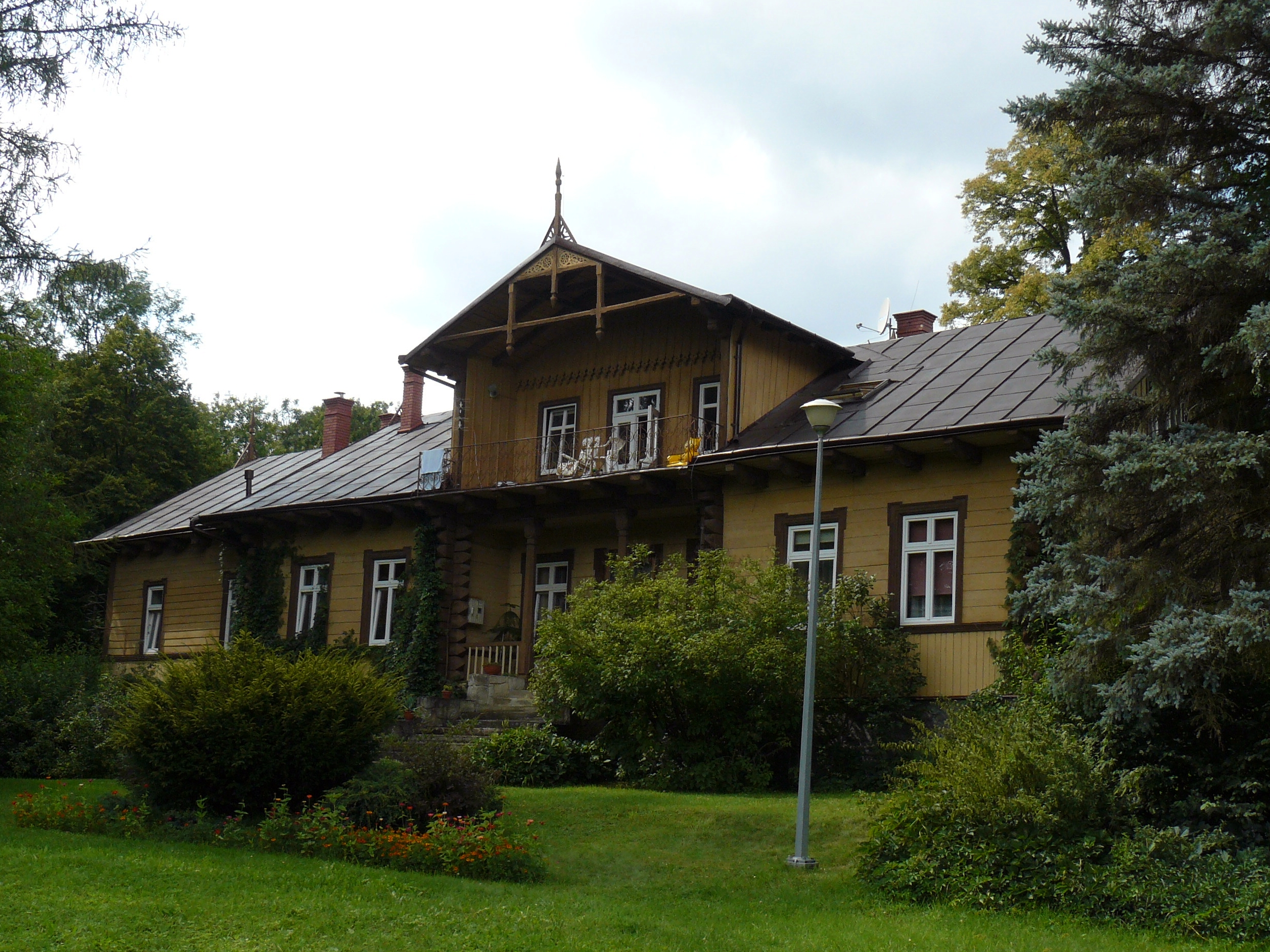 Dwór Groblewskich w Bystrzycy Szymbarskiej (Szymbark k/Gorlic),obecnie Stacja Naukowa Instytutu Geografii i Przestrzennego Zagospodarowania Polskiej Akademii Nauk